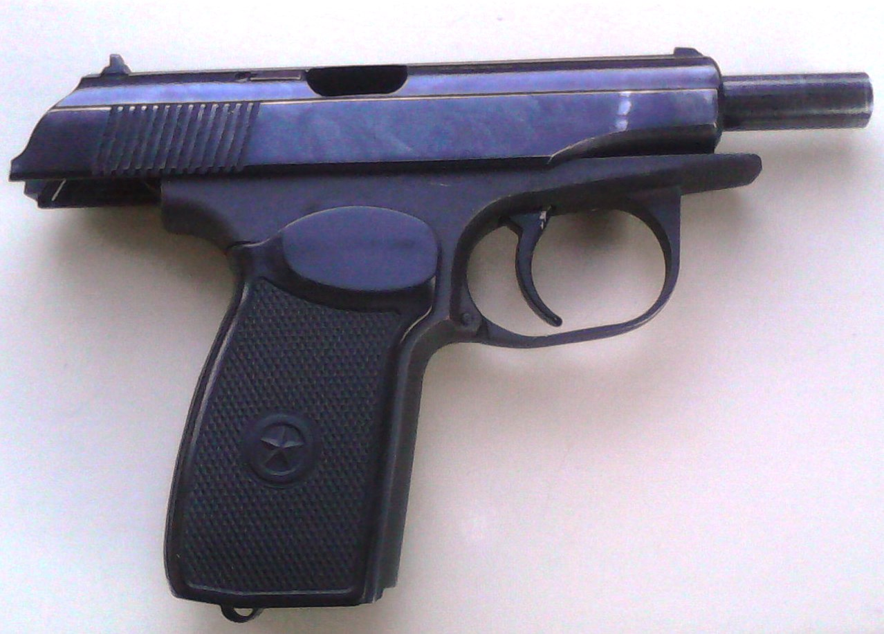 9-мм пистолет Макарова, вид справа, на затворной задержке.